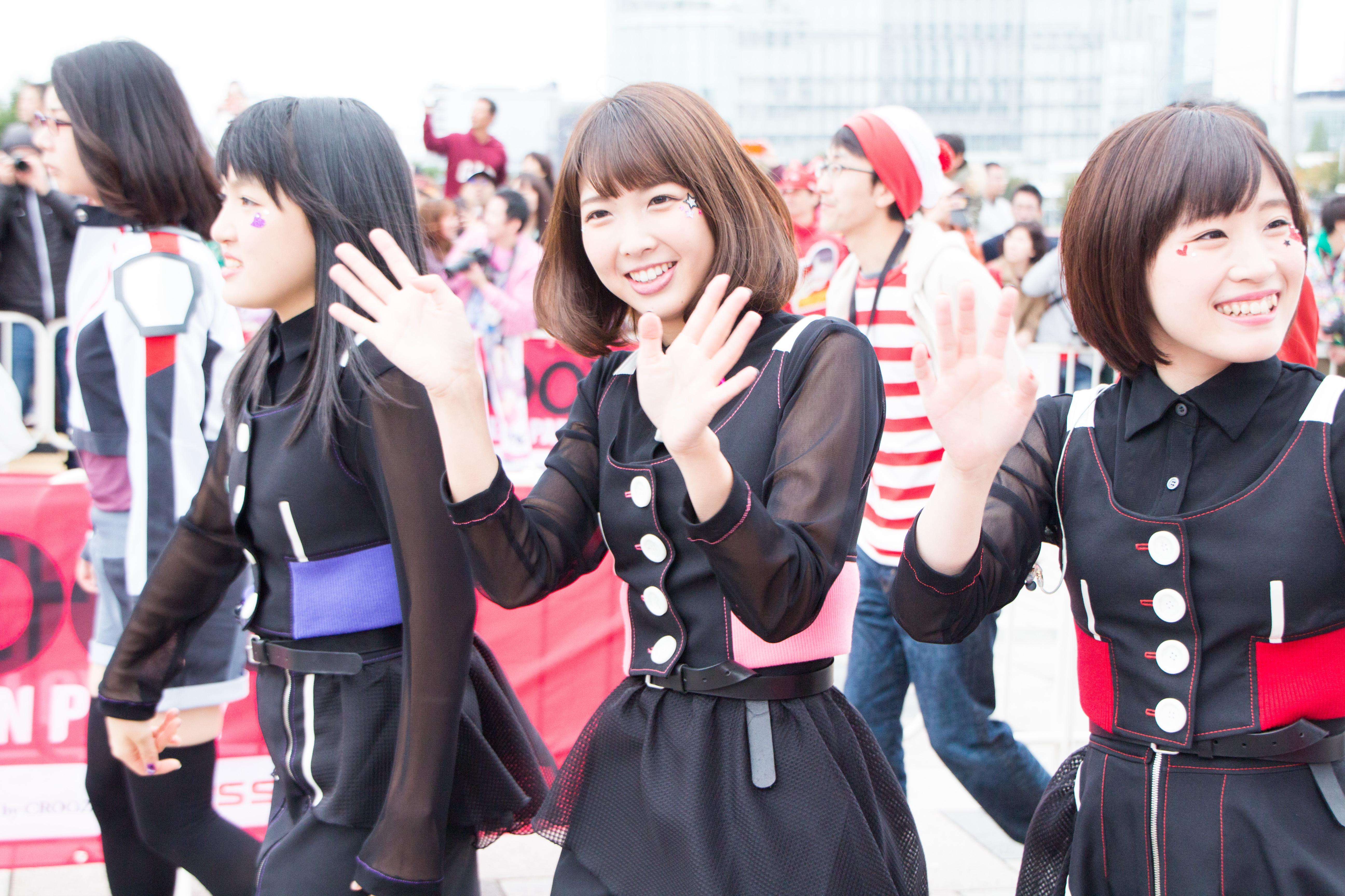 T-SPOOK 2016 小清水亜美 西田望見 鈴木みのり (ワルキューレ)